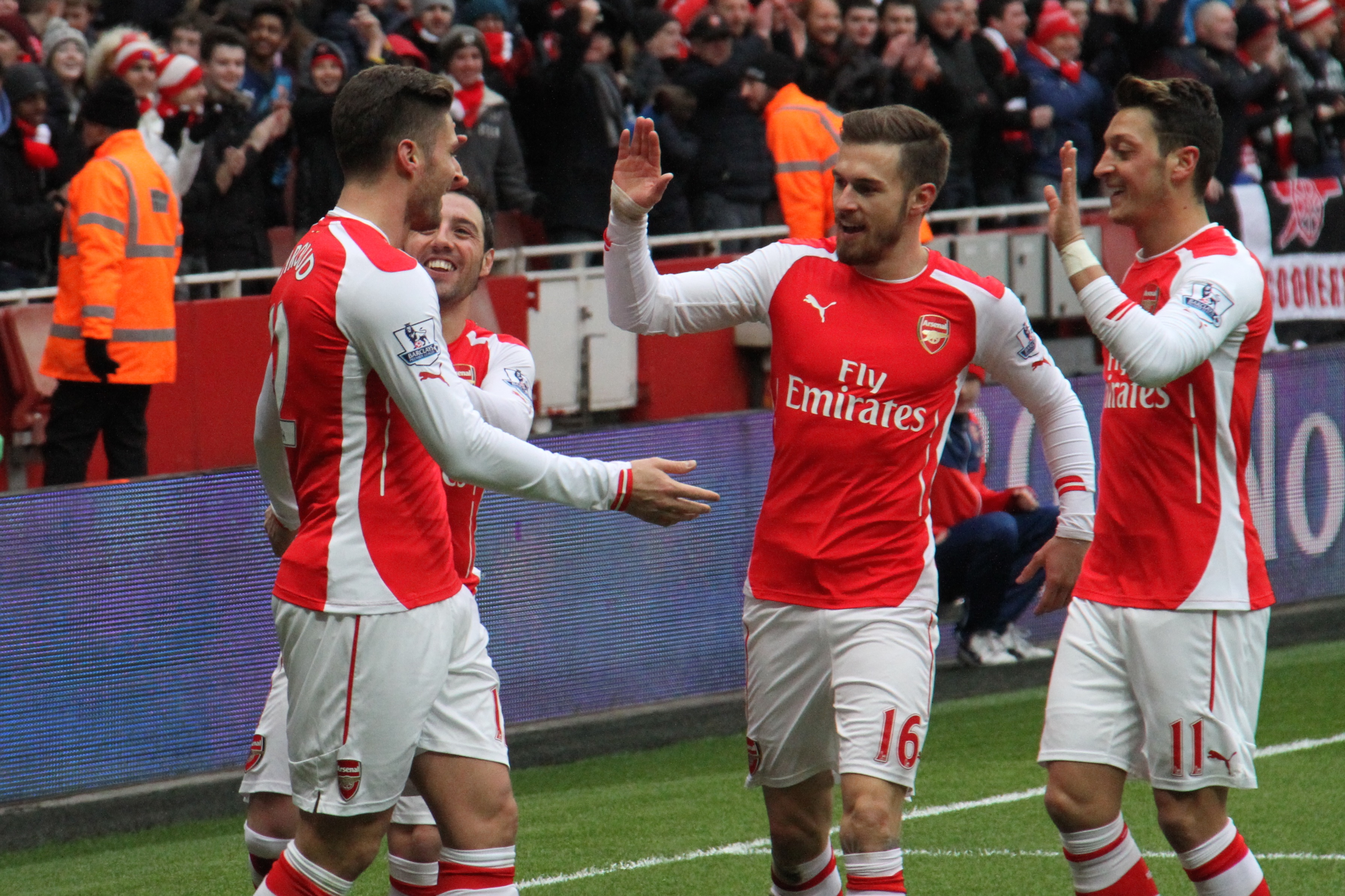 Giroud celebrates his goal 1